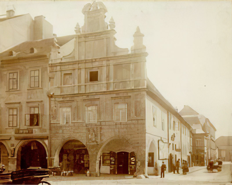 Stulíkův dům, předchůdce paláce Včela na rohu náměstí Přemysla Otakara II. a ulice Karla IV.